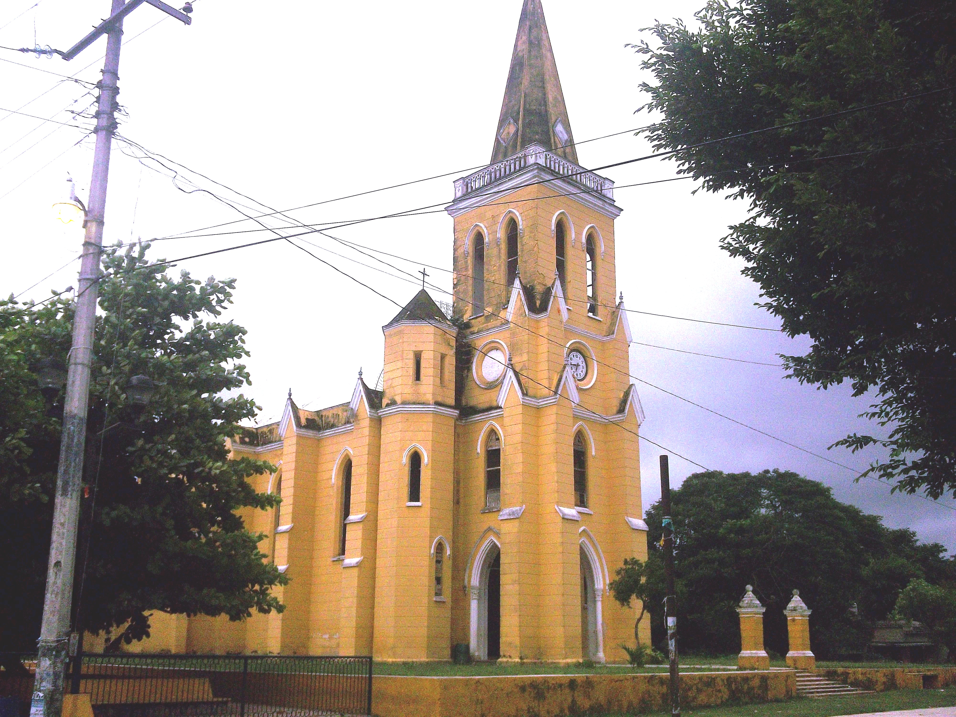 Iglesia de Eknakán, Yucatán.